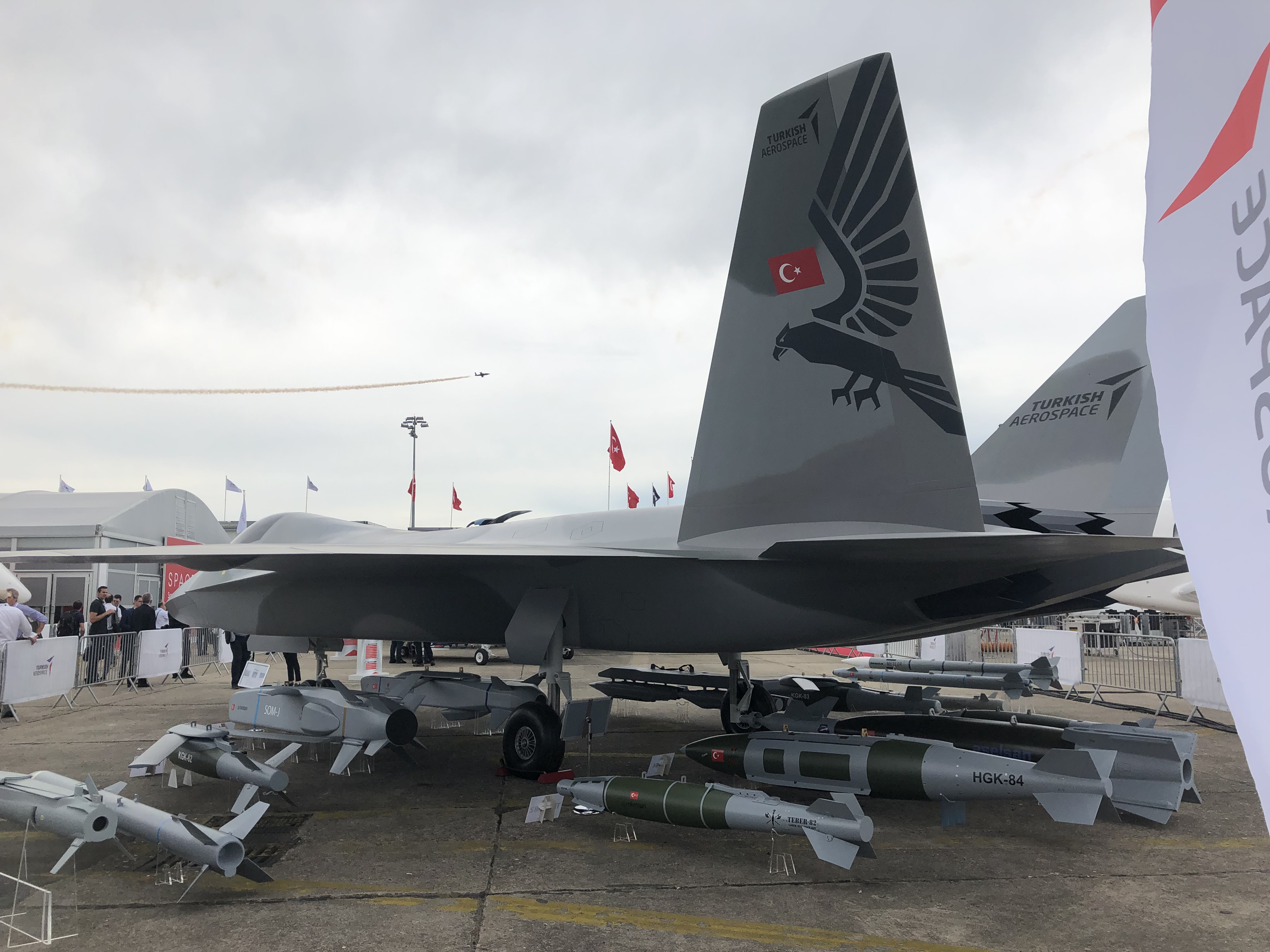 Maquette du TF-X de Turkish Aerospace industries au Bourget 2019